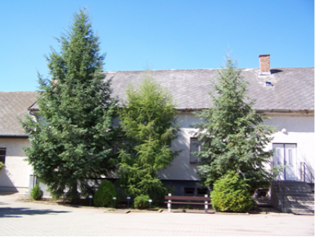 14 éves közönséges jegenyefenyők, közöttük egy európai vörösfenyő (Szabadegyháza Község Arborétuma)